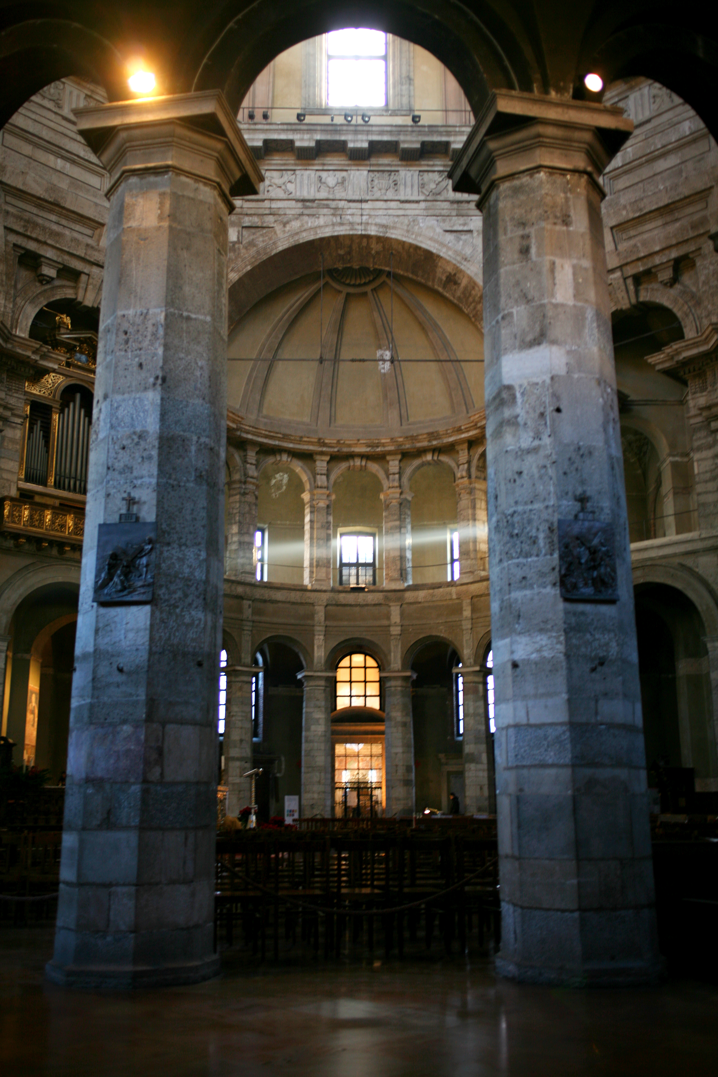 San Lorenzo, Milano, veduta prospettica dell'interno